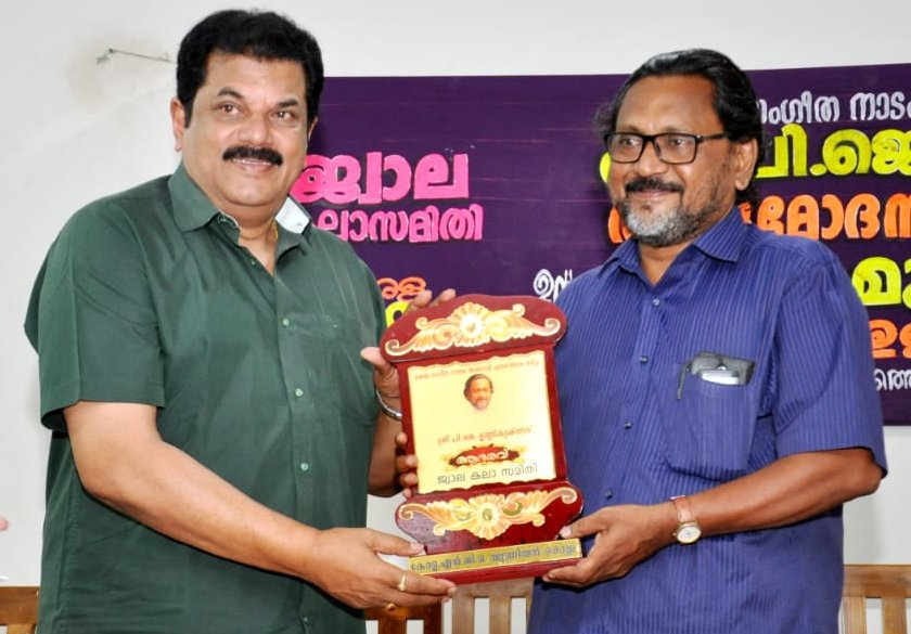 പി.ജെ. ഉണ്ണികൃഷ്ണന് ചലച്ചിത്ര താരം മുകേഷ് പുരസ്കാരം സമ്മാനിക്കുന്നു